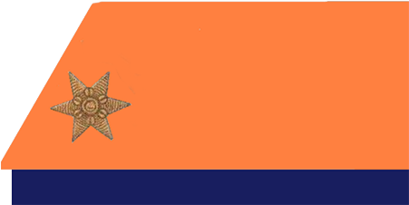 Leutnant der k.u.k. Arme mit orangegelber Egalisierung